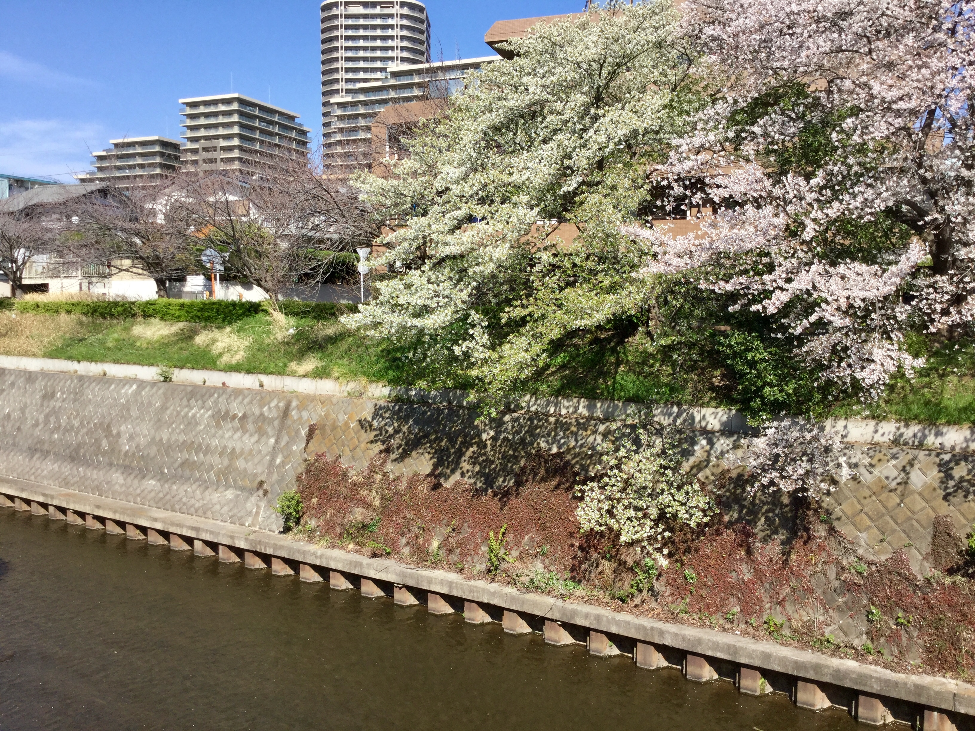 引地川(湘南台4丁目)